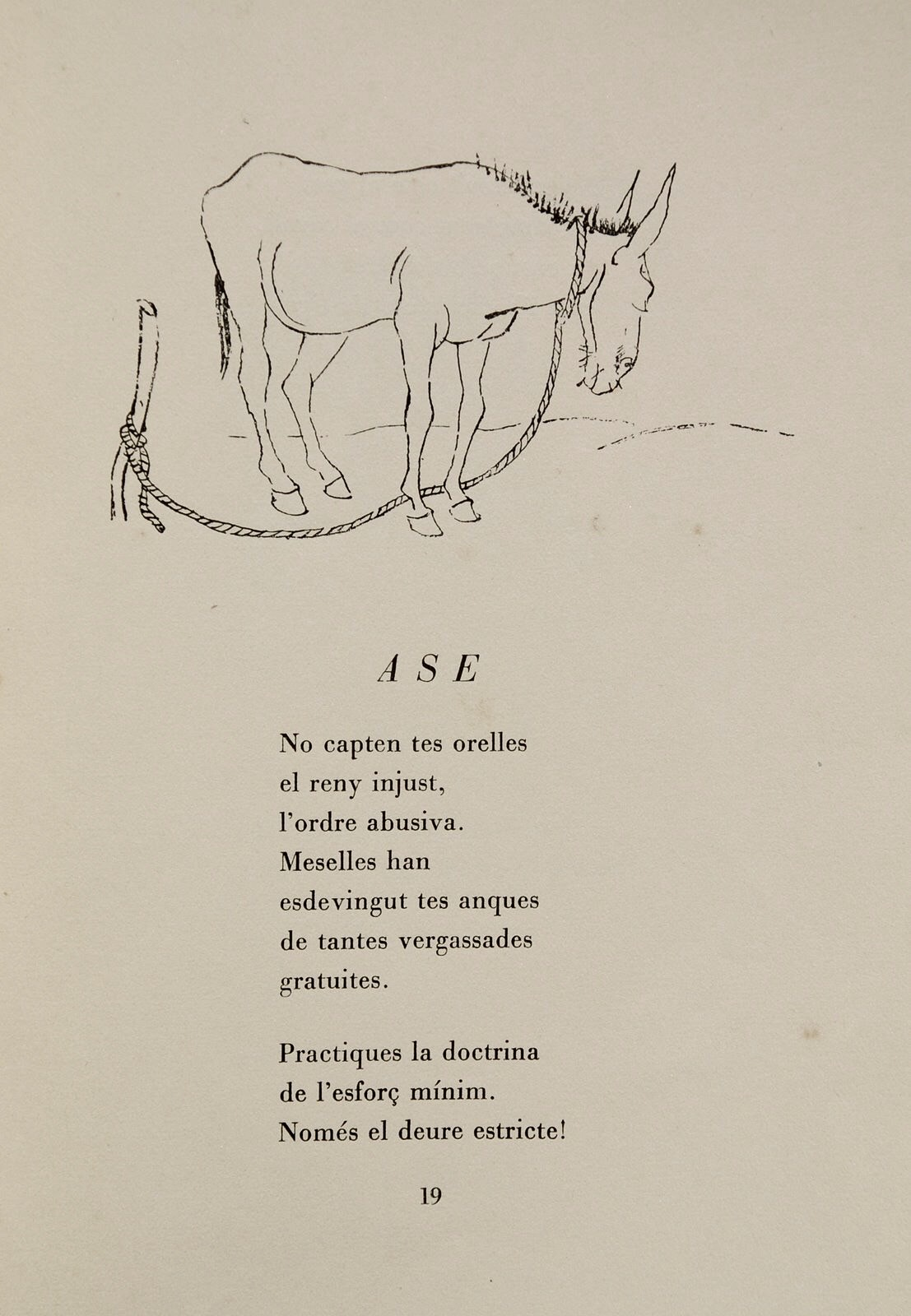 L'Ase del Bestiari de Pere Quart (1937)